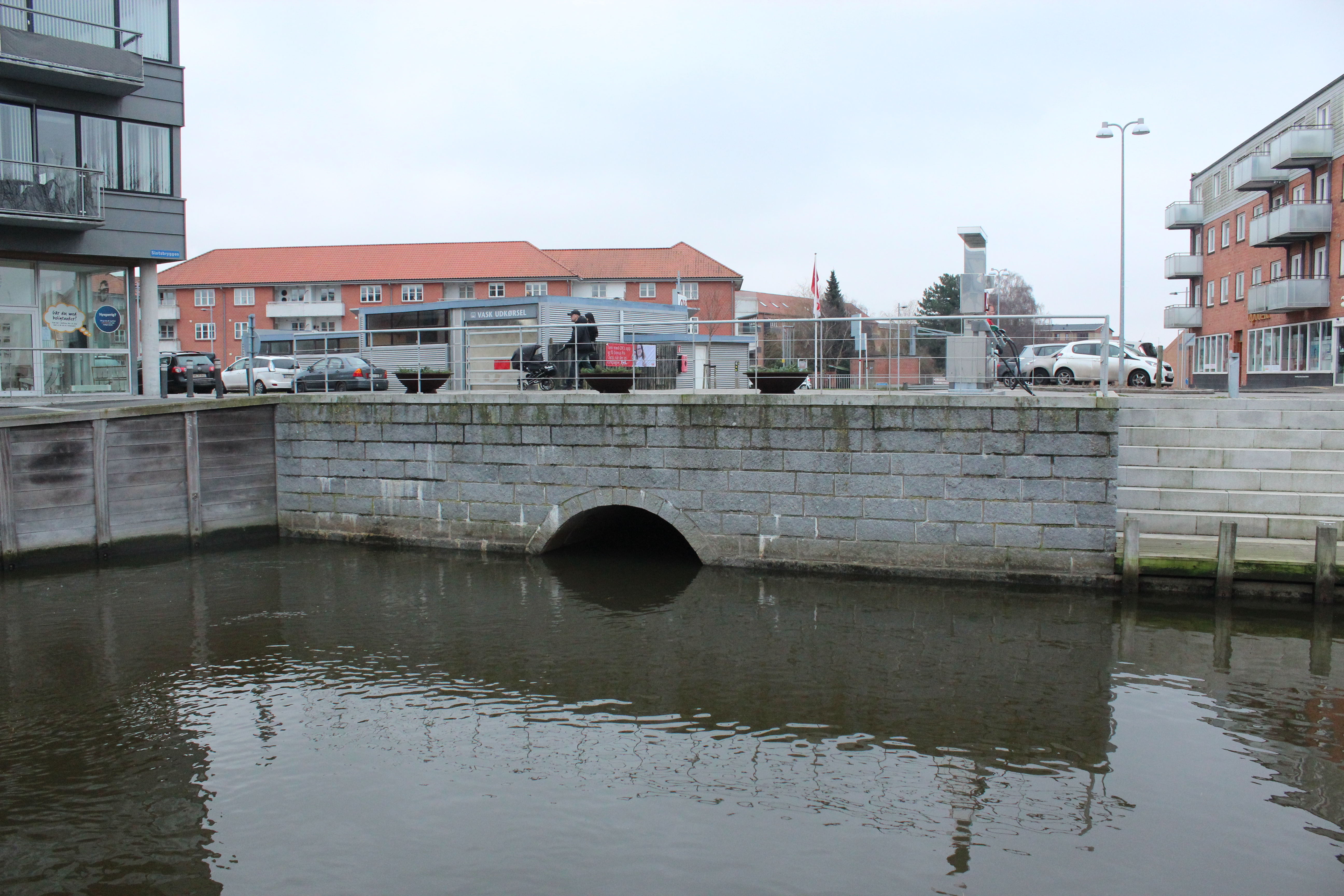 Udløbet af Tingsted Å ved slotsbryggen i Nykøbing Falster.